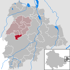 Göllnitz in Thuringia - District Altenburger Land